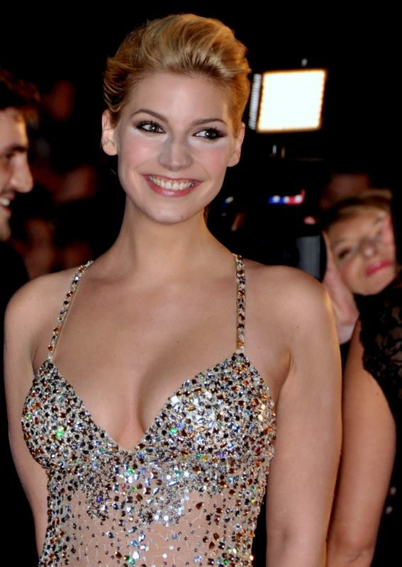 Nadège Lacroix (de "Secret Story") aux NRJ Music Awards